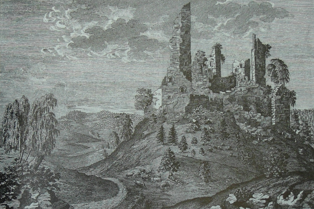 Ansicht der Burgruine Wildenfels aus südlicher Richtung